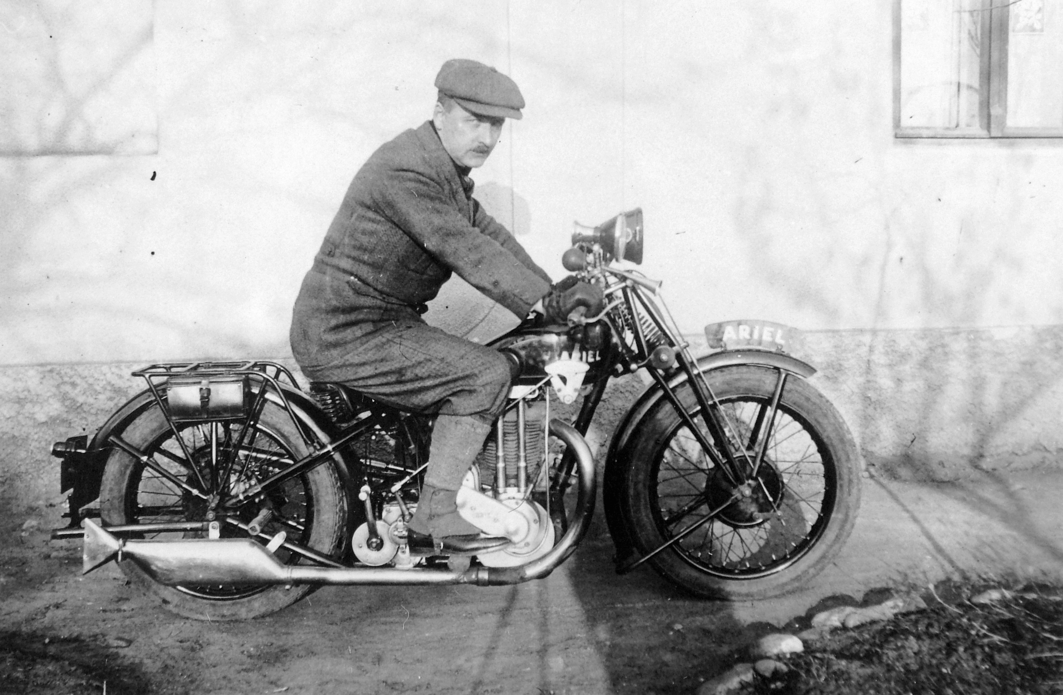 Ariel Model D típusú motorkerékpár. Tags: motorcycle, Ariel-brand, British brand, vehicle, transport Title: Ariel Model D típusú motorkerékpár.